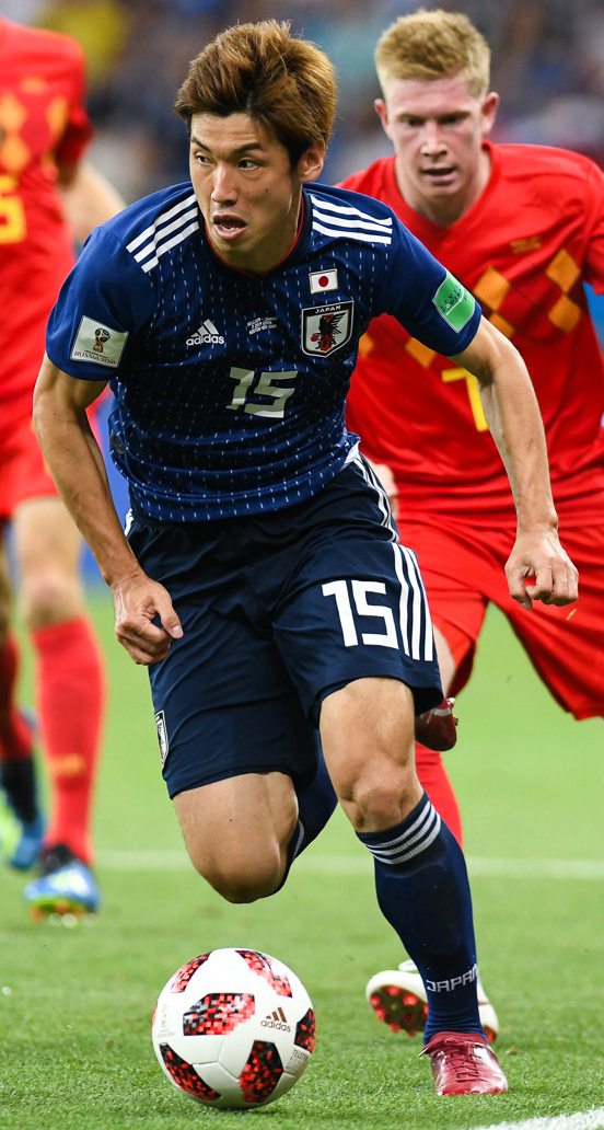 Потрясающий камбэк сборной Бельгии в матче с Японией